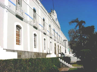 Made by JesusMX. Fotografia personal de uso libre